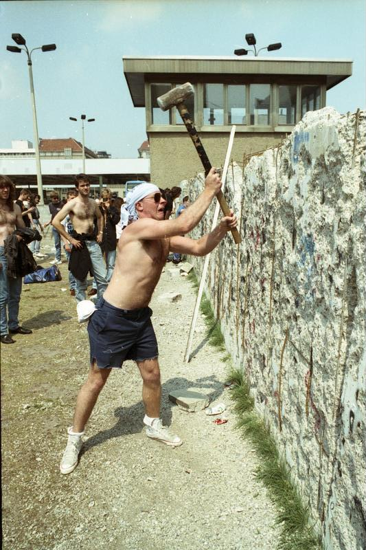 Berlin, "Mauerspecht" BER-404 KB/22.7.90/Berlin: Rockspektakel "The Wall"/ Bereits acht Stunden vor Beginn der gigantischen Rockshow am Potsdamer Platz (Nacht vom 21. zum 22.7.) war das Areal im Stadtzentrum von Zuschauern aus aller Welt belagert. Unermüdlich auch hier ein "Mauerspecht" vor Ort, der die vielleicht letzte Chance nutzt, um in den Besitz eines Originalstückes der Berliner Mauer zu kommen. [Berlin, Stadtzentrum.- Aufführung der Rockoper "The Wall", wartender Konzertbesucher beim Herausbrechen eines Mauerstücks.]